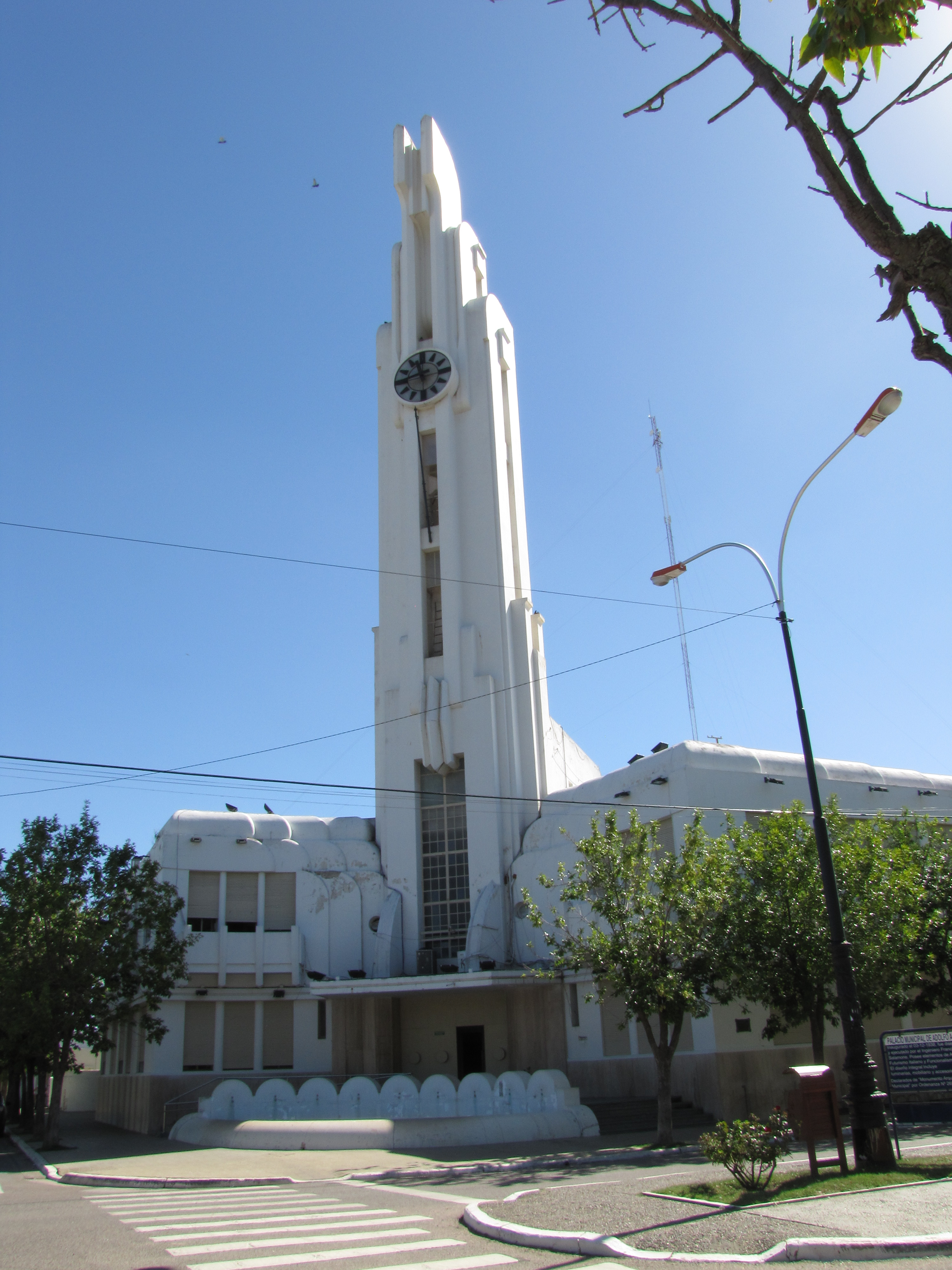 Palacio Municipal de Carhué